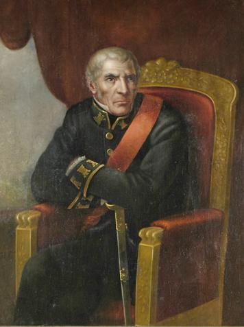 Pintura oficial del gobernador durante la colonia